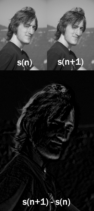 Senyal bidimensional diferència Señal bidimensional diferencia